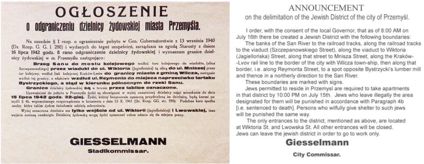 Ogłoszenie o odgraniczeniu dzielnicy żydowskiej miasta Przemyśla.